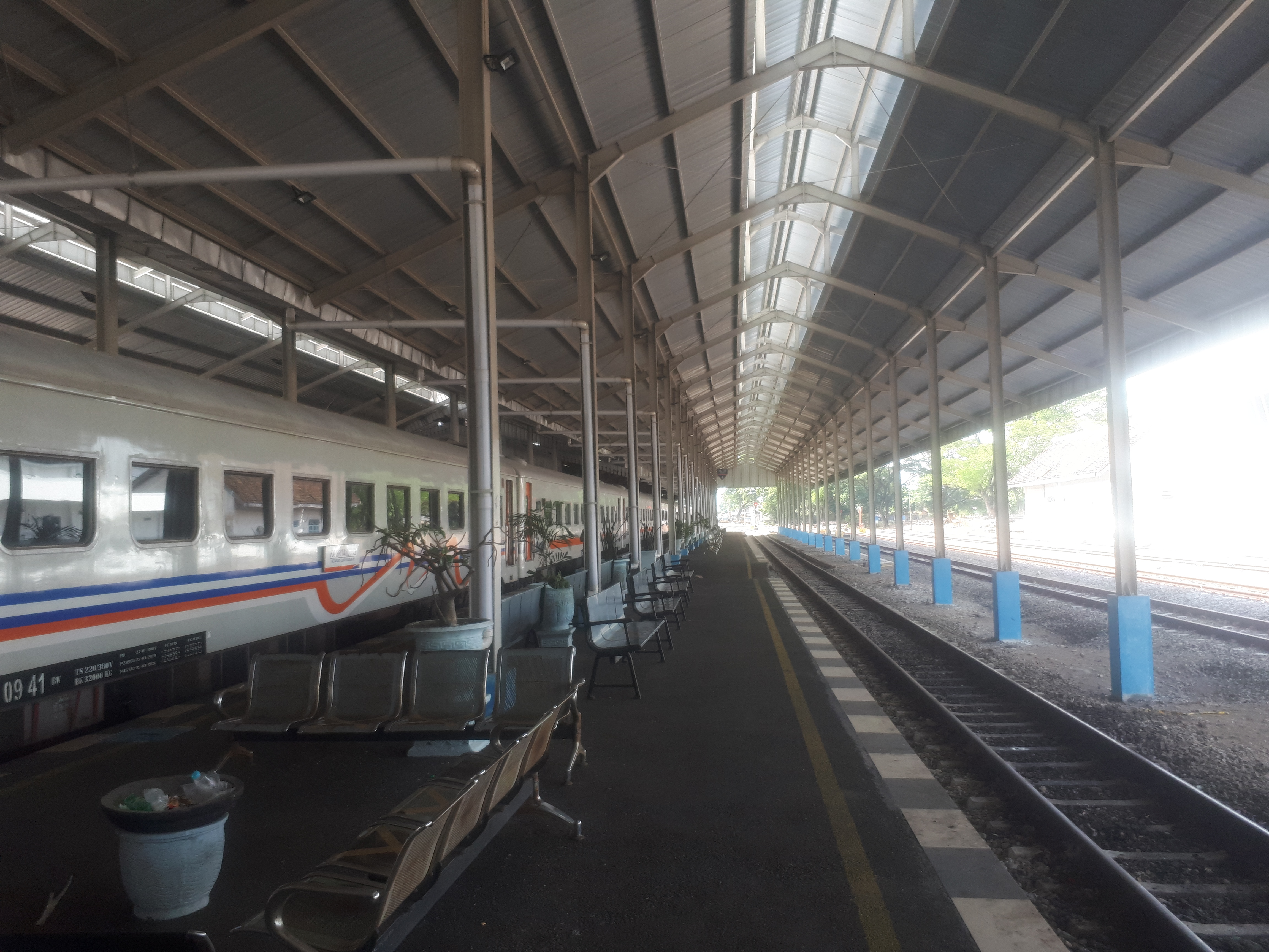 Peron Stasiun Jombang, 2020